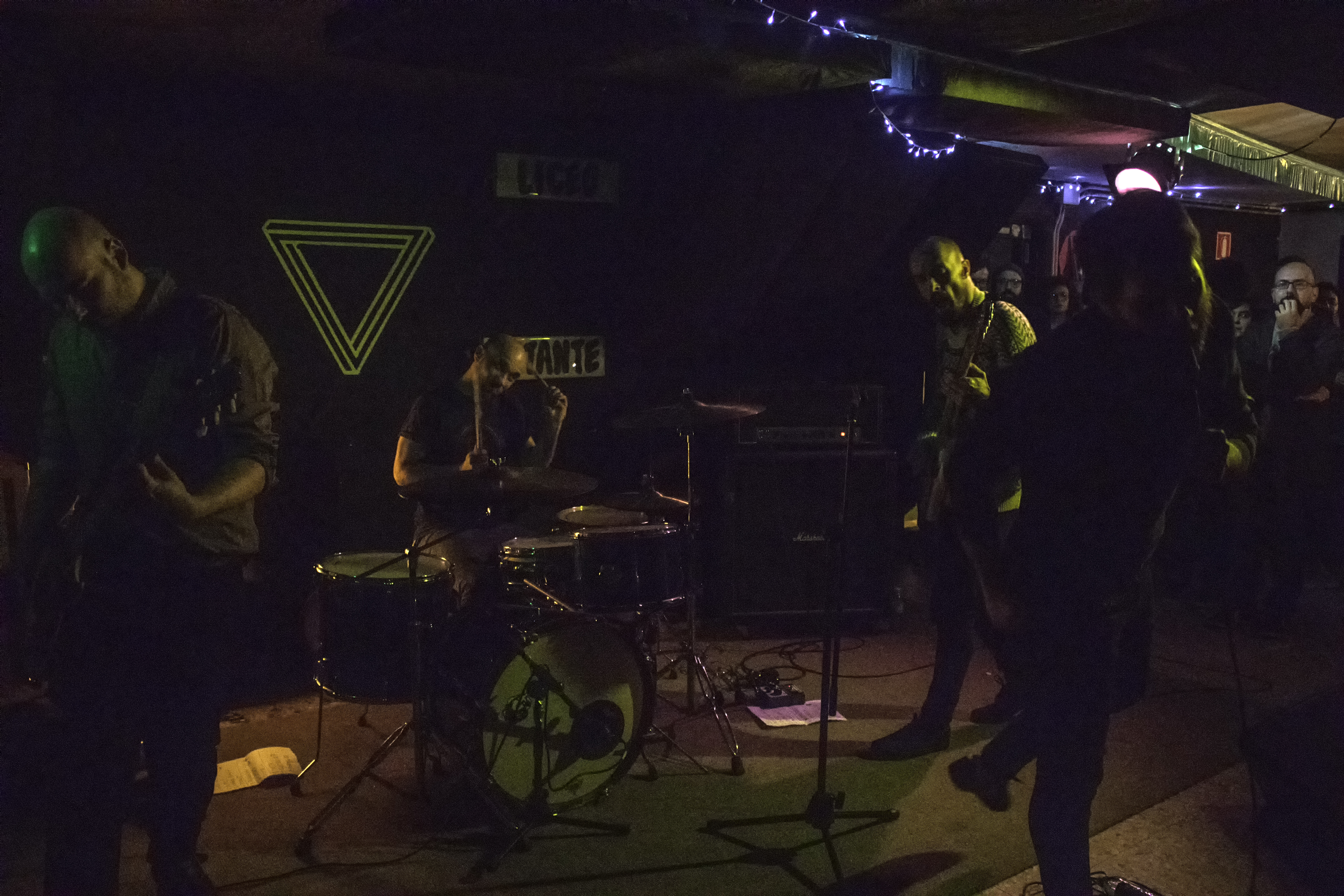 A banda de hardcore punk pontevedresa Cuchillo de Fuego actuando no Liceo Mutante.